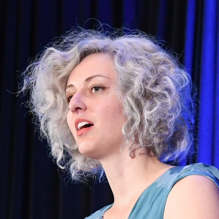 2 March 2017